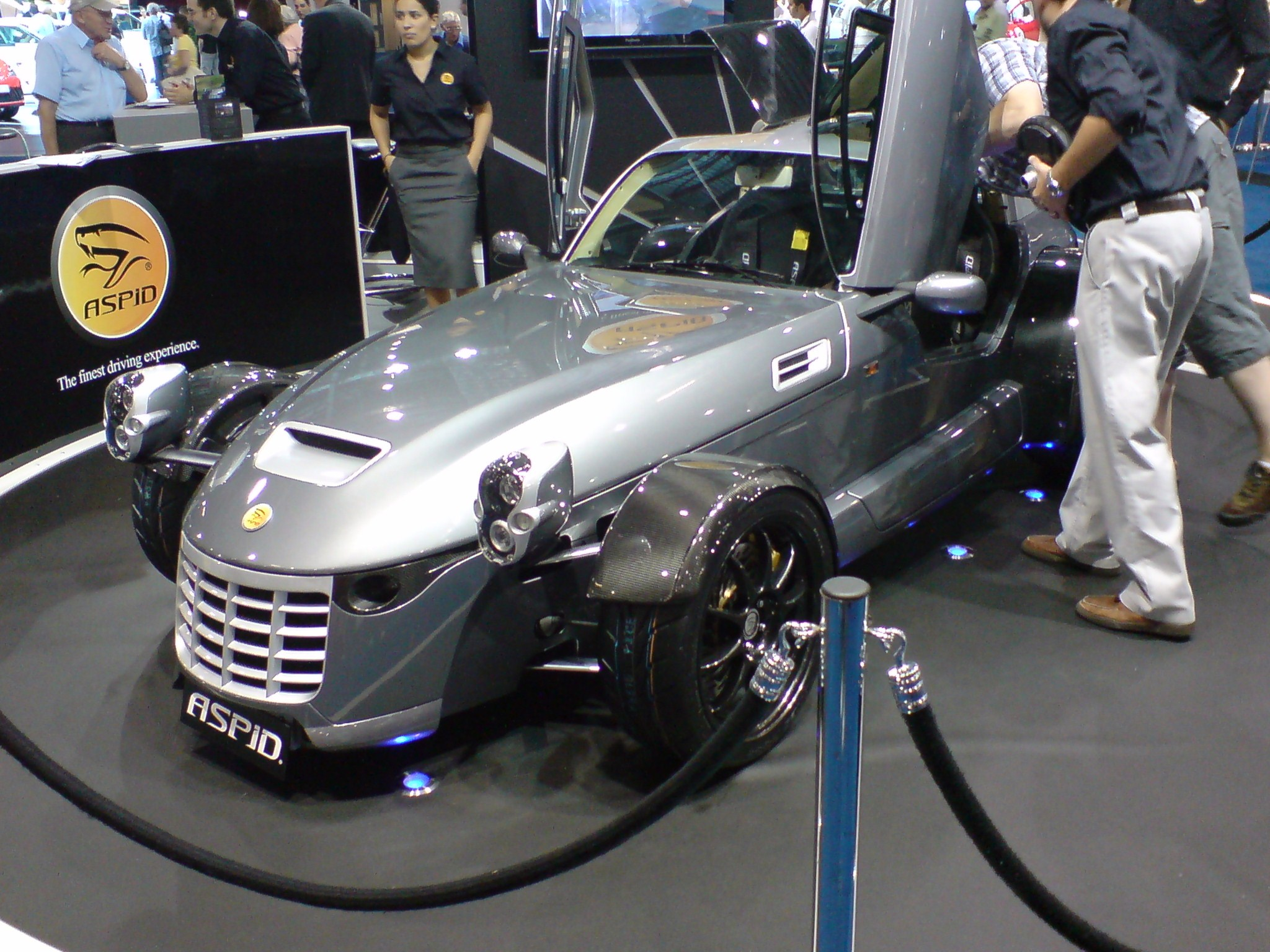 Aspid